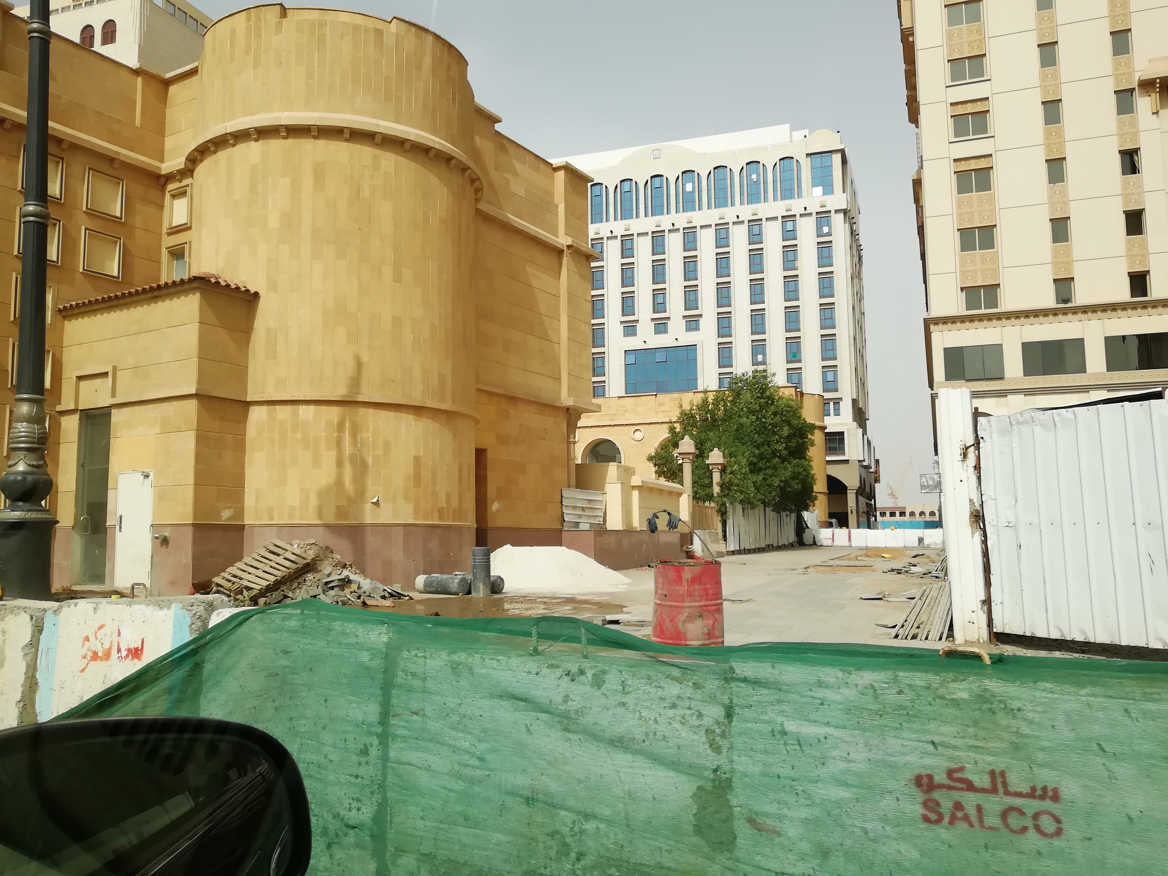 al-Madinah al-Munawarah Saqiefat Bani Saaeda? سقيفة بني ساعدة؟